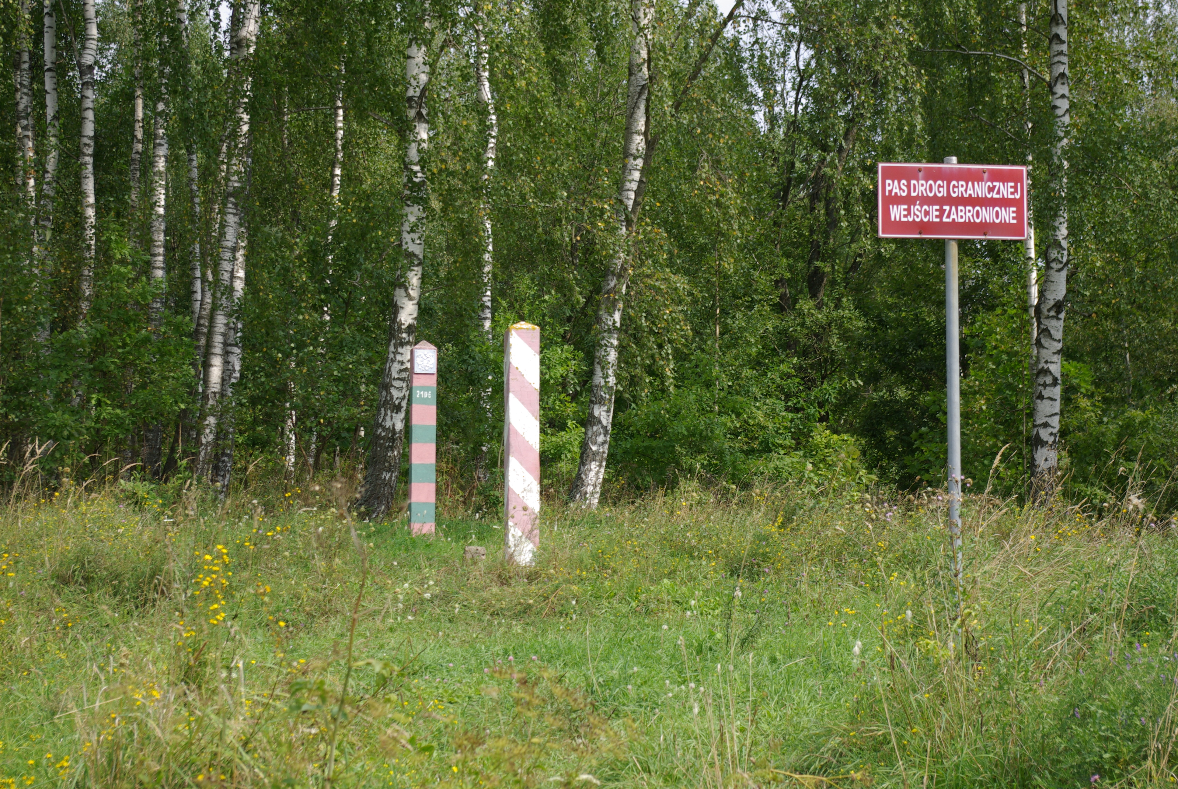 Polnisch-russische Grenze zwischen Rapa (Angerapp, 1938-1945: Kleinangerapp) im polnischen Powiat Gołdapski und Osjorsk (Darkehmen, 1938: Darkheim, 1938-1945: Angerapp) in der russischen Oblast Kaliningrad